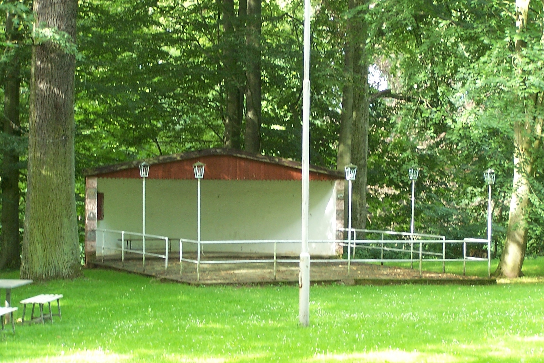 Ansichten und Details zum Volkspark in Gehaus.